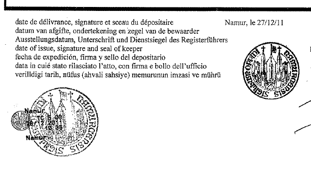 Sigilla oppidi Namurcensis latine scripta